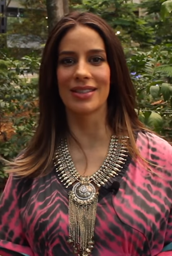 Manuela González estuvo de paso por nuestra nueva sede y aprovechamos para conocerla un poco más. ¡Hermosa persona!